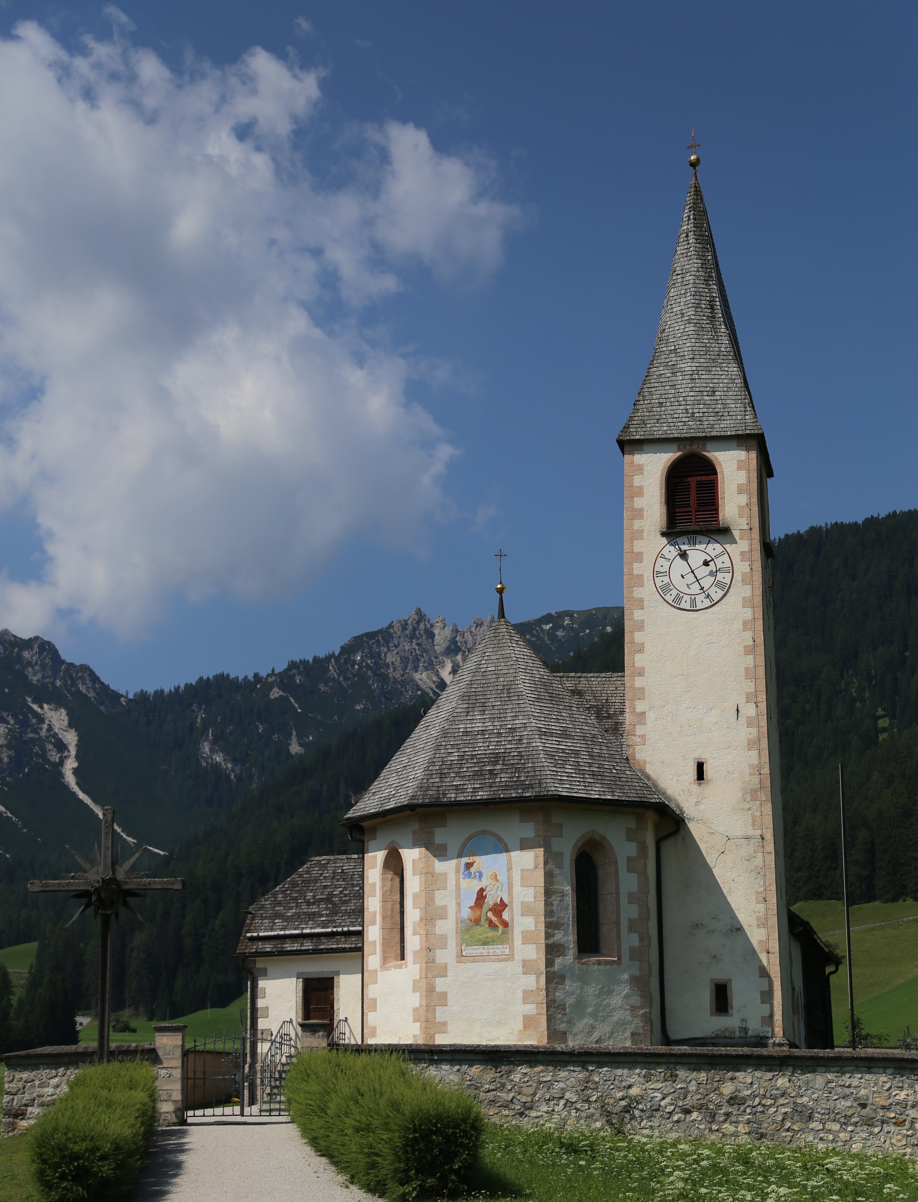 Pfarrkirche St. Veit, Prags